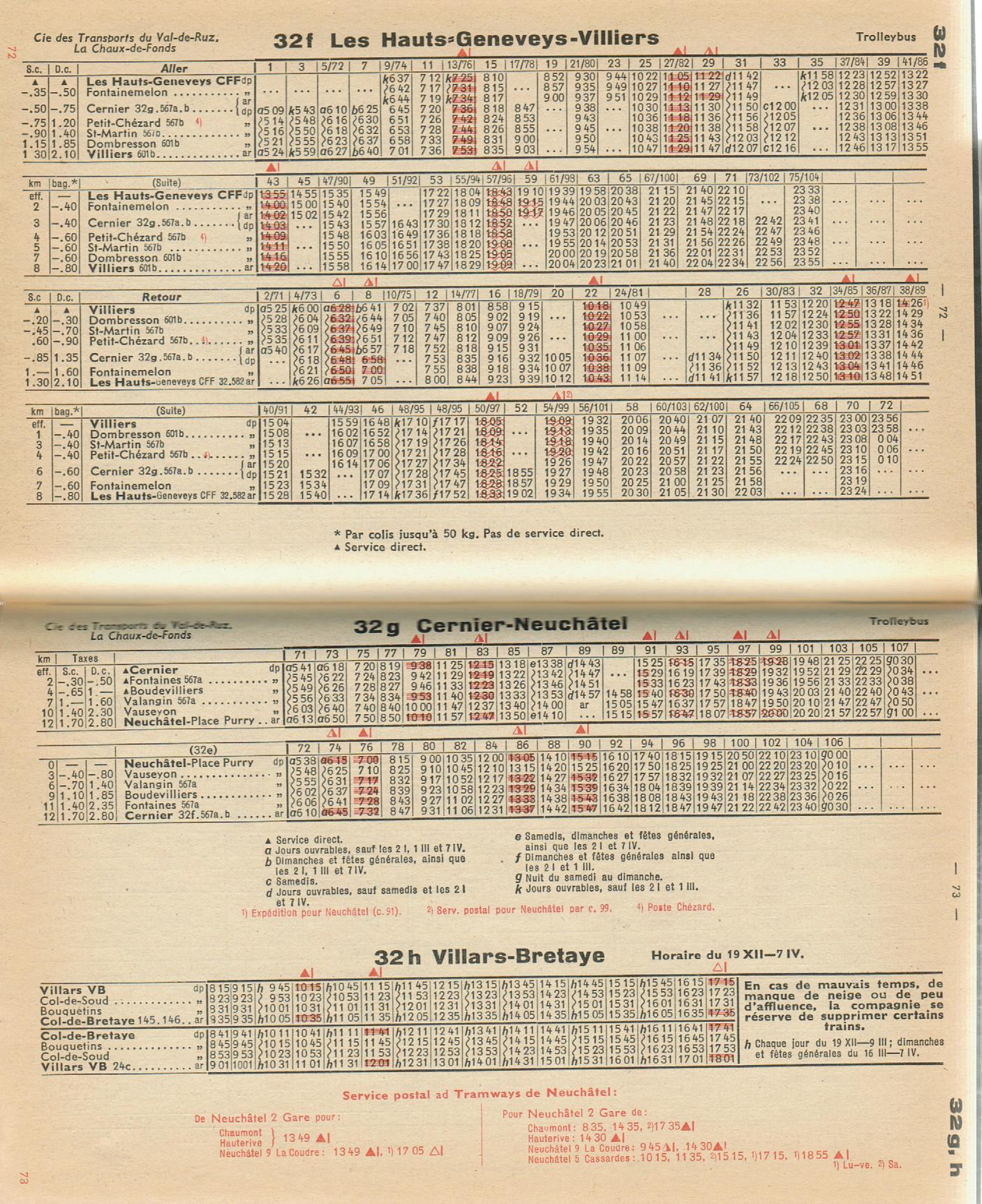 Winterfahrplan 1957/58 für die Trolleybuslinien im Val de Ruz